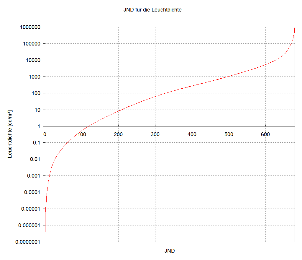 JND der Leuchtdichte